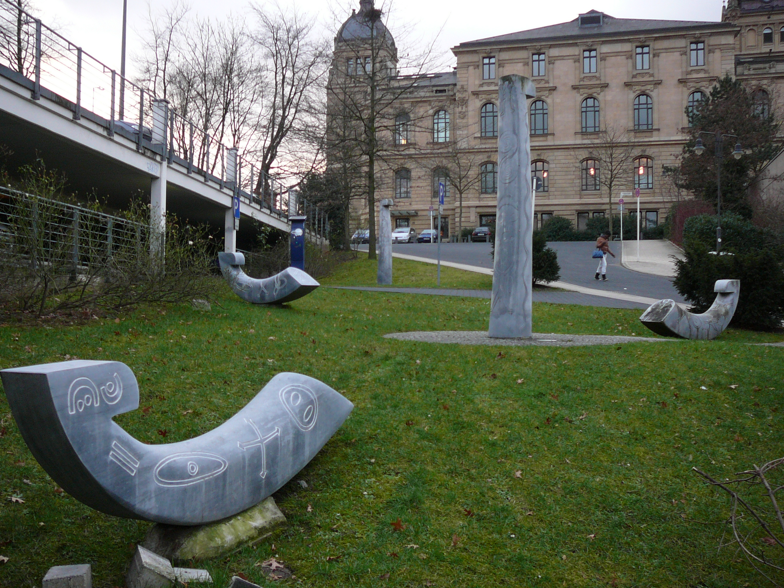 Johannisberg, Wuppertal